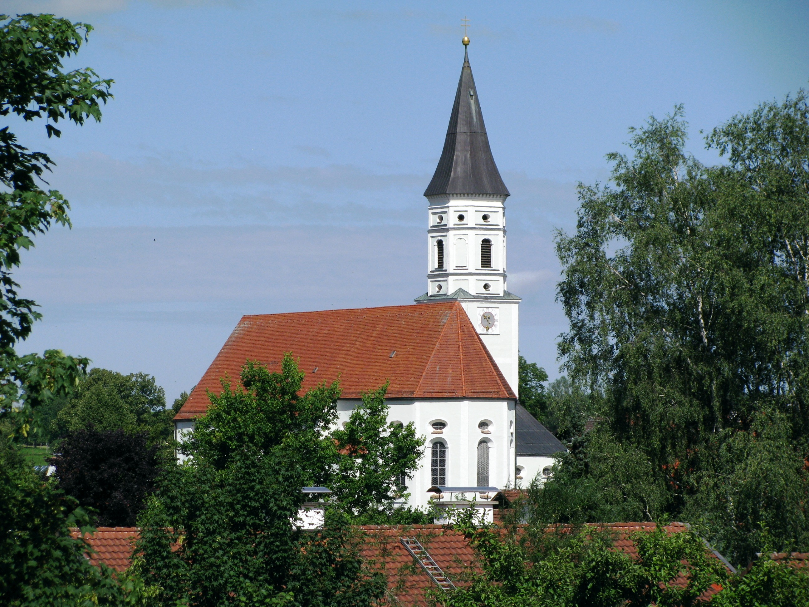 Kath. Pfarrkirche St. Ulrich in Habach im Landkreis Weilheim-Schongau.